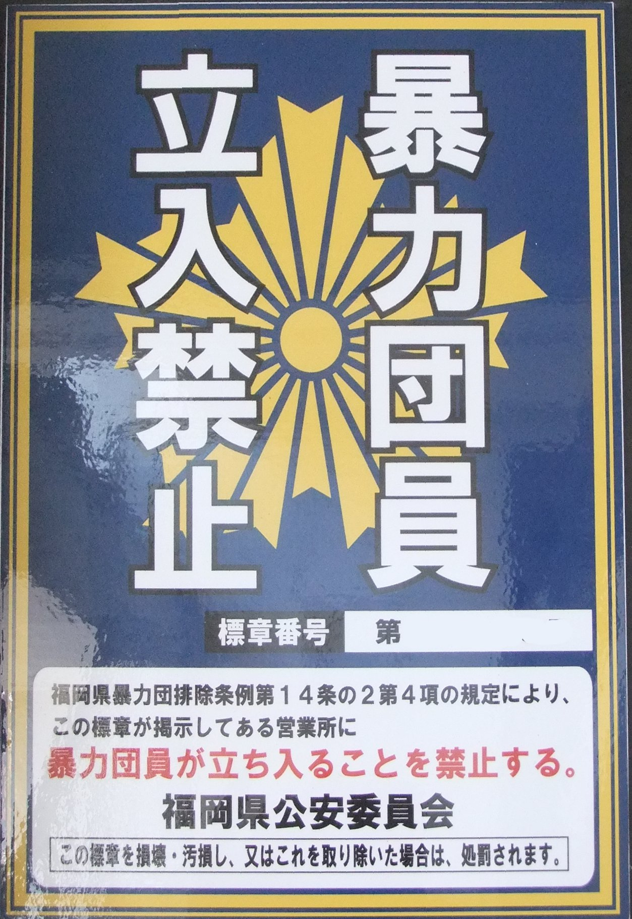 福岡市博多区中洲で撮影 レタッチ済み